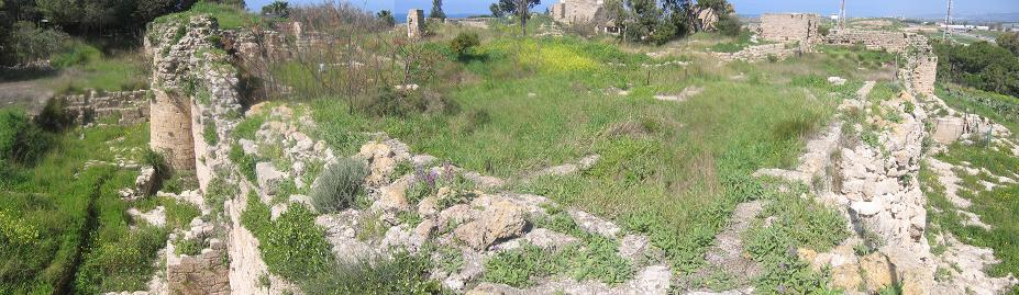 צילום פנורמי של מבצר כפרלט הצלבני שבמושב הבונים.צילמתי, גזרתי, הדבקתי והעלתי במרץ 2006.אסף.צ 12:49, 3 מרץ 2006 (UTC) The crusader fortress of Caferlet, HaBonim, Israel